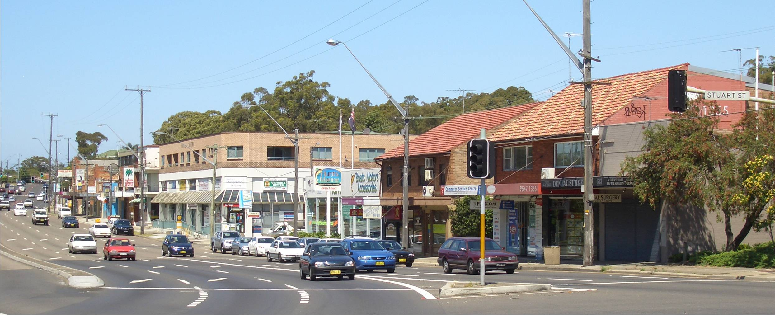 Blakehurst